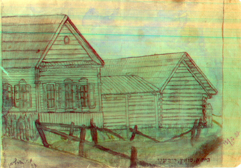 ציור של העיירה רייביני, שצויר ע"י בן העיירה, מאיר אור.